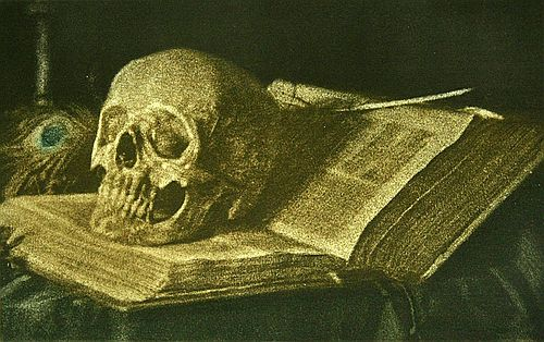 Hans Watzek Stilleben [Die Kunst in der Photographie (Art Folio #3)] 1898